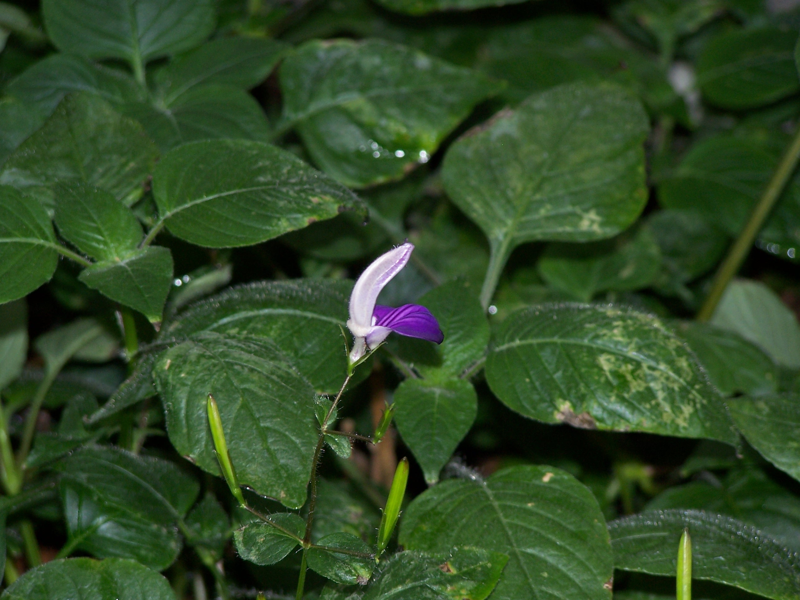 Brillantaisia lamium 17 juin 2006 Vieux jardin botanique de Göttingen